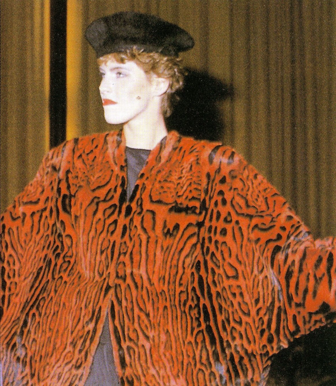 Kürschner-Modetreffen mit etwa 300 Teilnehmern im Saalbau in Essen, 1986. Eigentlich unter der Leitung von Dieter Zoern, Hamburg, dessen Flugzeug jedoch wegen einer Bombendrohung für seinen Flug aus Marokko verspätet, erst zum Ende der Veranstaltung ankam. Die Moderation übernahm stattdessen Obermeister Walter Schöne, Essen. Rot gefärber Ozelot, umgearbeitet und gefärbt aus einem alten Kundenpelz. Dieter Zoern.